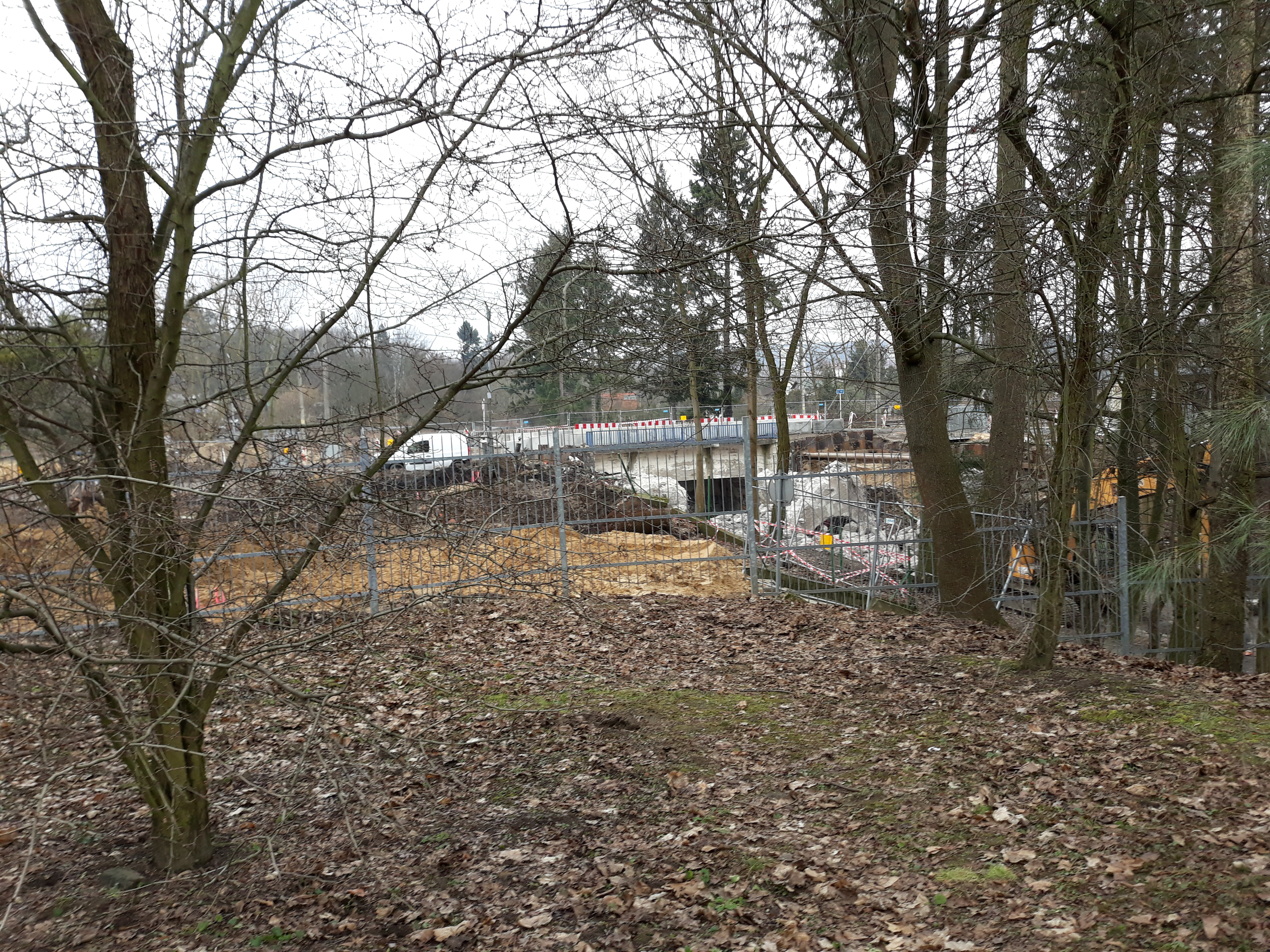 Budowa węzła komunikacyjnego Szczecin-Łękno